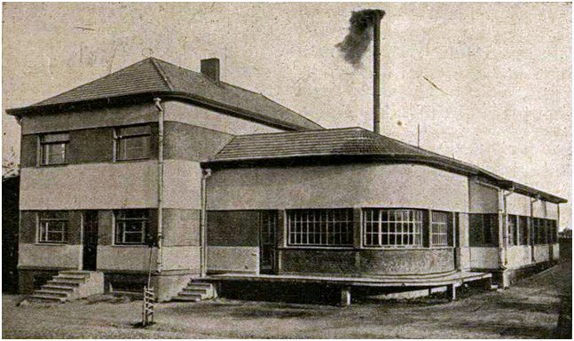 Kooperatinė Kvėdarnos pieninė